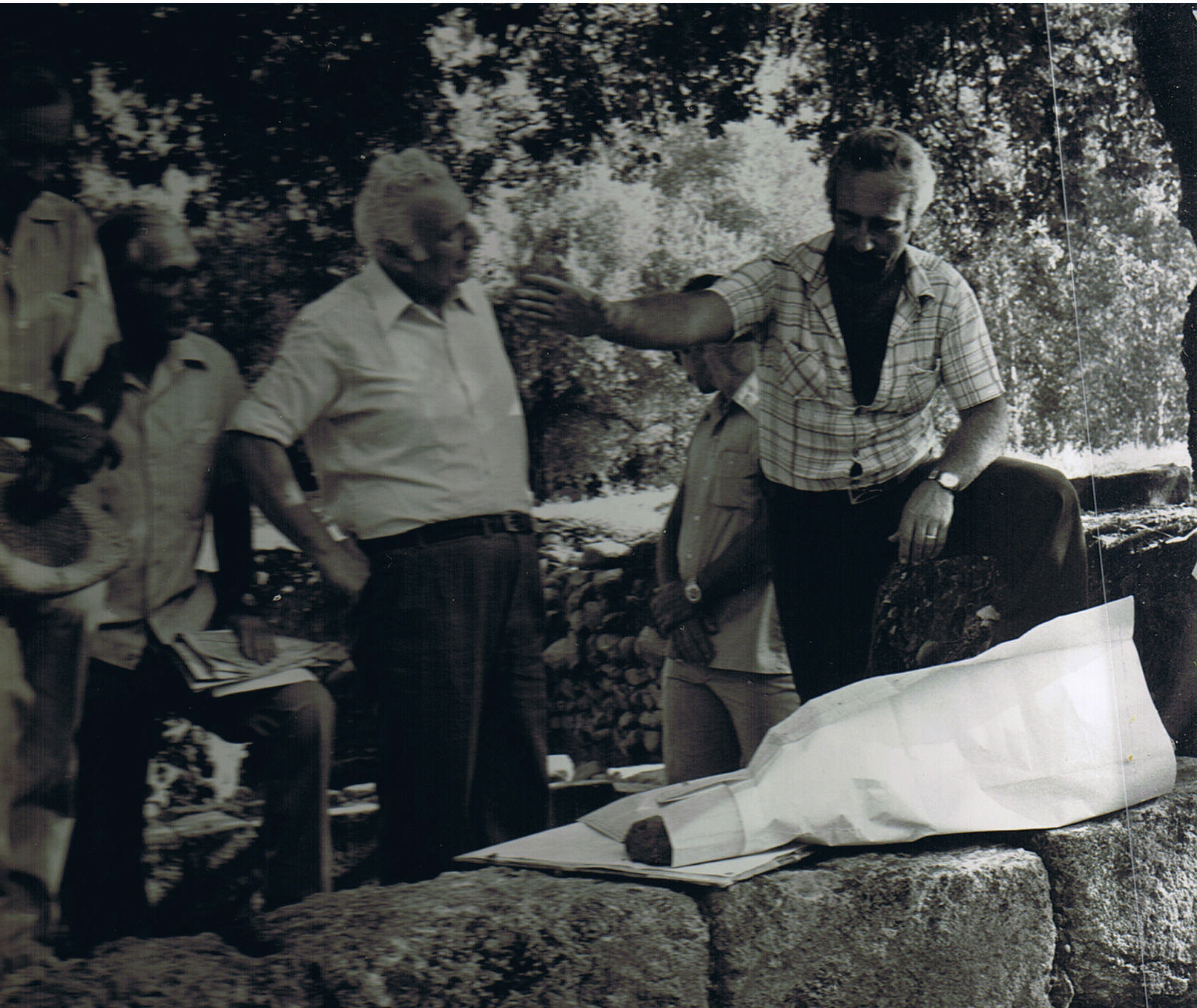 Vassilios Tzaferis – Israeli Archaeologist with Ephraim Katzir thr forth president of Israel at Tel Dan וסיליוס צפיריס, ארכאולוג ישראלי ממוצא יווני. נולד באי סאמוס ביוון. חבר בקהילה היוונית בישראל. חפר בבניאס, כורסי כפר נחום ועוד. צפיריס מימין מסביר על החפירות בתל דן שבצפון לאפרים קציר נשיאה הרביעי של מדינת ישראל התמונה צולמה בשנות השבעים המאוחרות